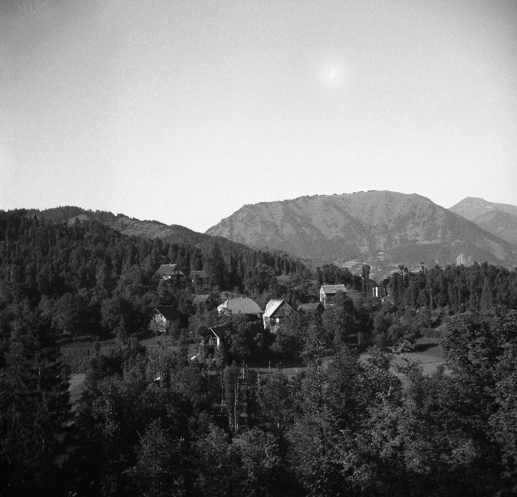 Daber, vas pri Šentviški Gori.